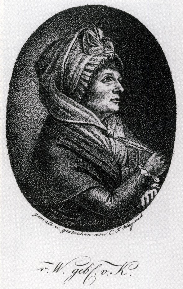 Portrait der deutschen Schriftstellerin Johanna Isabella Eleonore von Wallenrodt als Witwe.